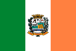 Bandeira de Paraíso - SP - Brasil.